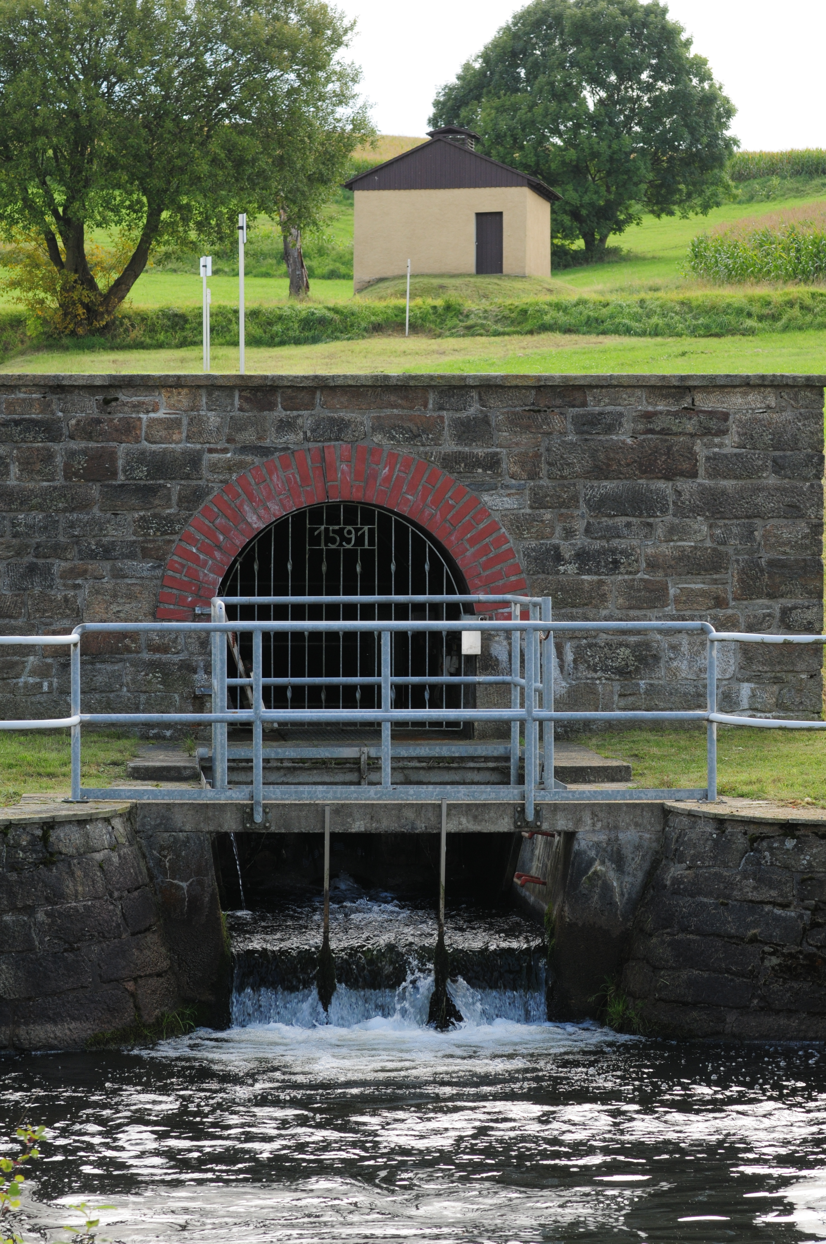 Großhartmannsdorfer, Mundloch der Mittelsaidaer Rösche am Oberen Großhartmannsdorfer Teich (Landkreis Mittelsachsen, Sachsen, Deutschland)